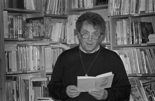 Gustl Weishappel bei einer Lesung in einer Buchhandlung in Gräfelfing. In seinen Händen das Buch: Mitteilungen an Max über den Stand der Dinge und anderes von Wolfgang Hildesheimer. Veröffentlicht in: Münchner Merkur Nr. 268, Donnerstag, 21. November 1991, Seite W3